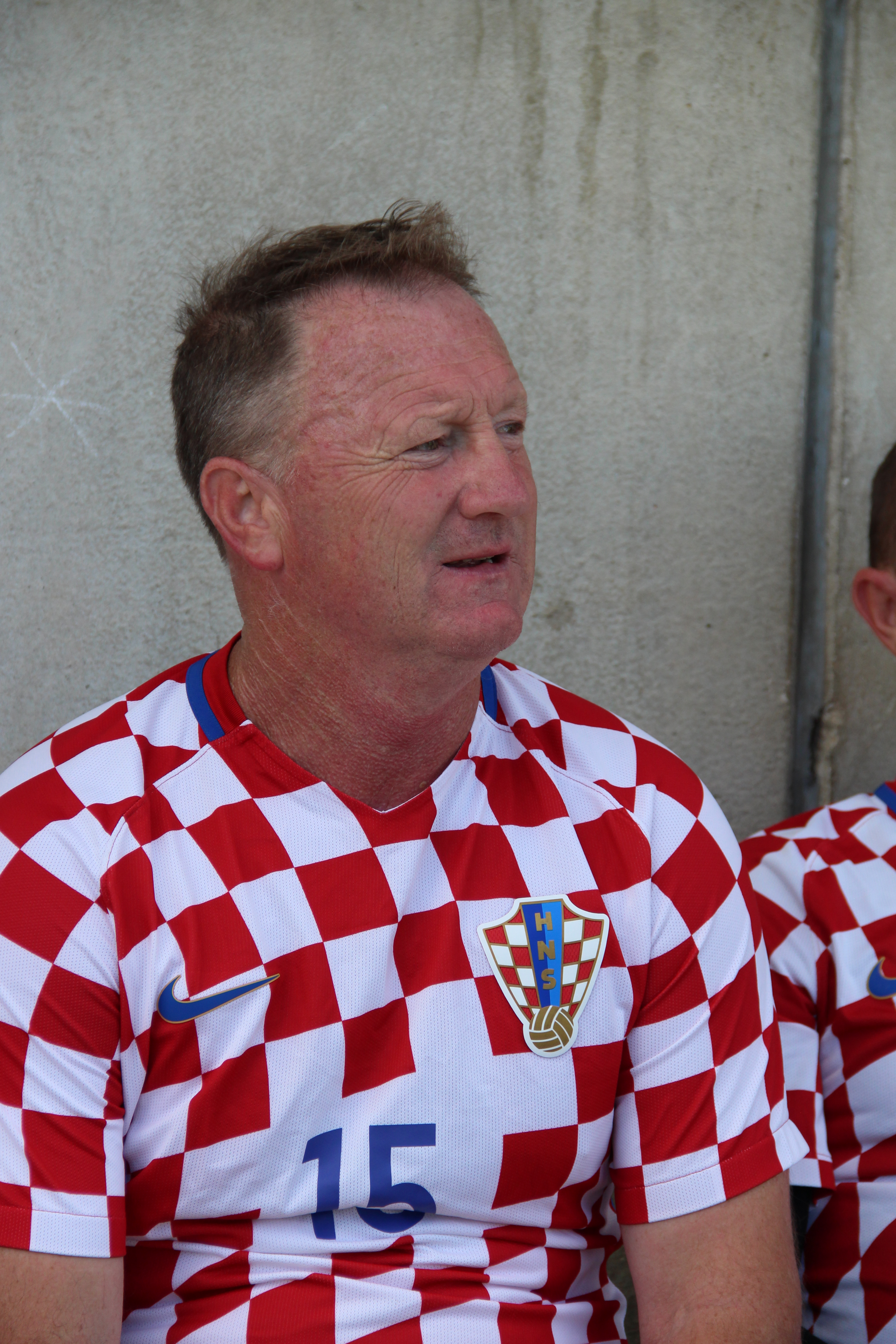 Zeltweger Legendenturnier 2018